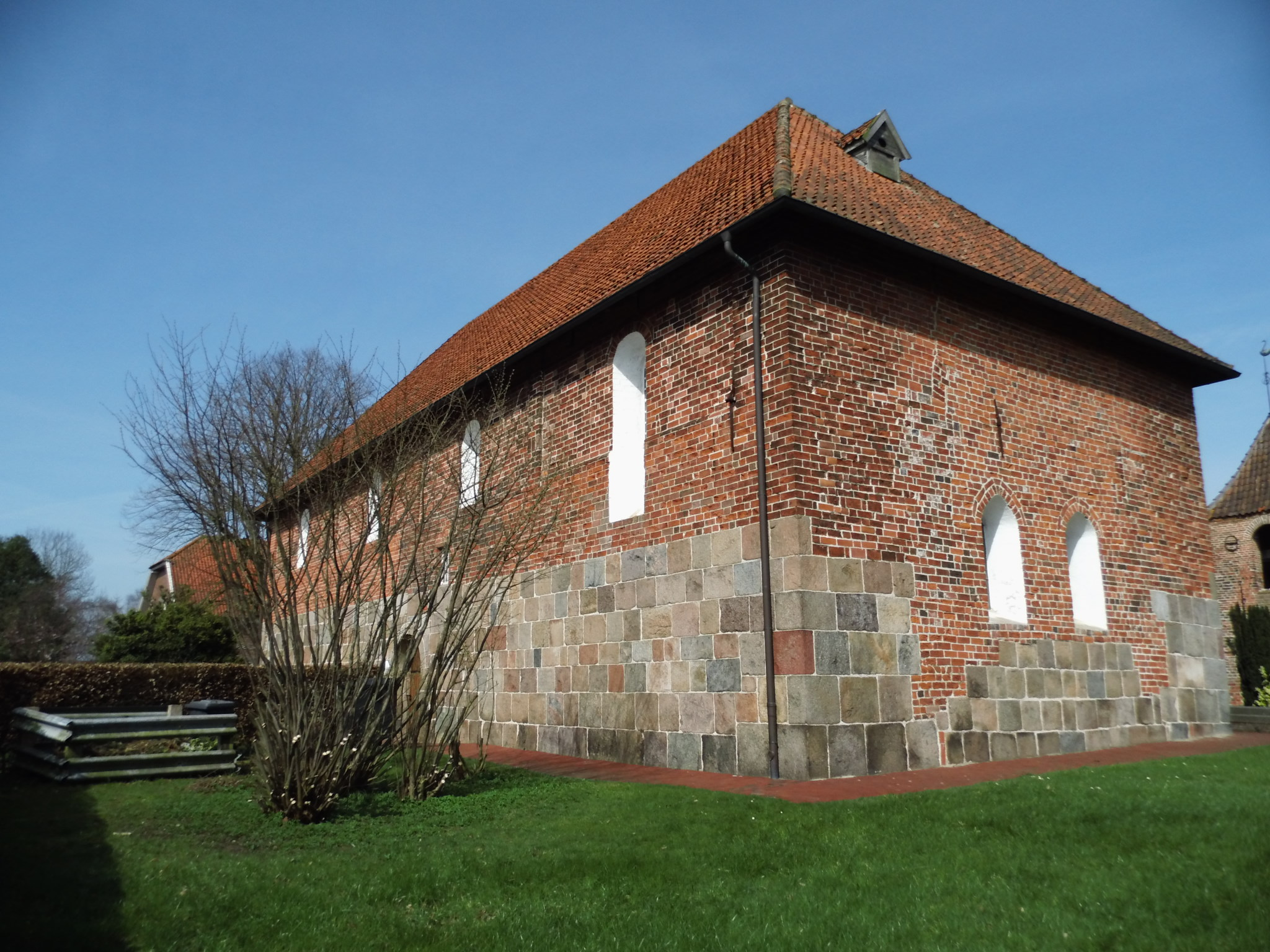 Ardorfer Kirche von Südosten, Ardorf, Stadtteil der Stadt Wittmund, Landkreis Wittmund, Niedersachsen, Deutschland]